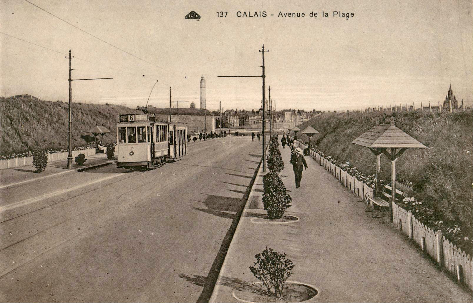 Carte postale ancienne éditée par CAP, n°137 : CALAIS - Avenue de la Plage